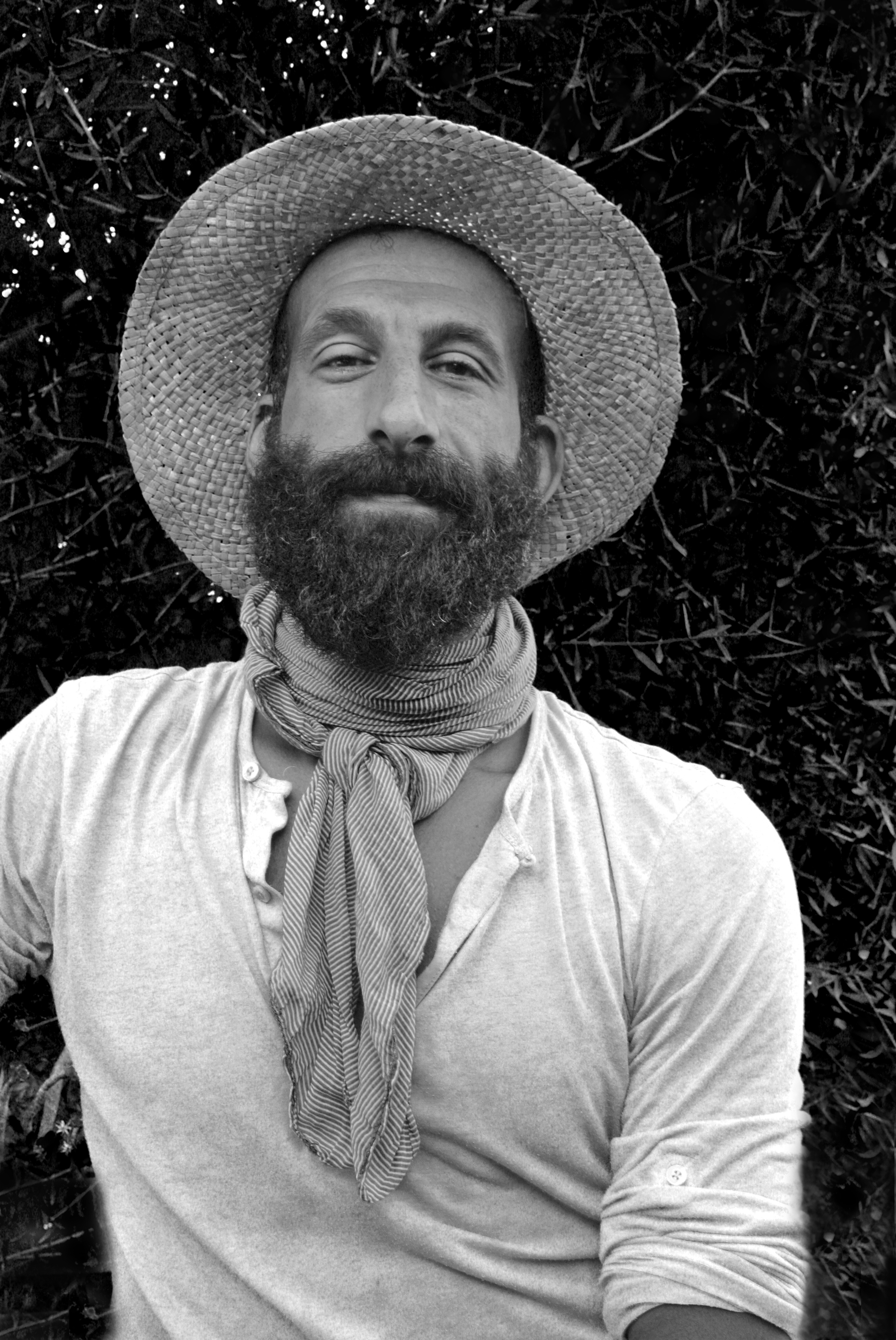 Setaufnahme